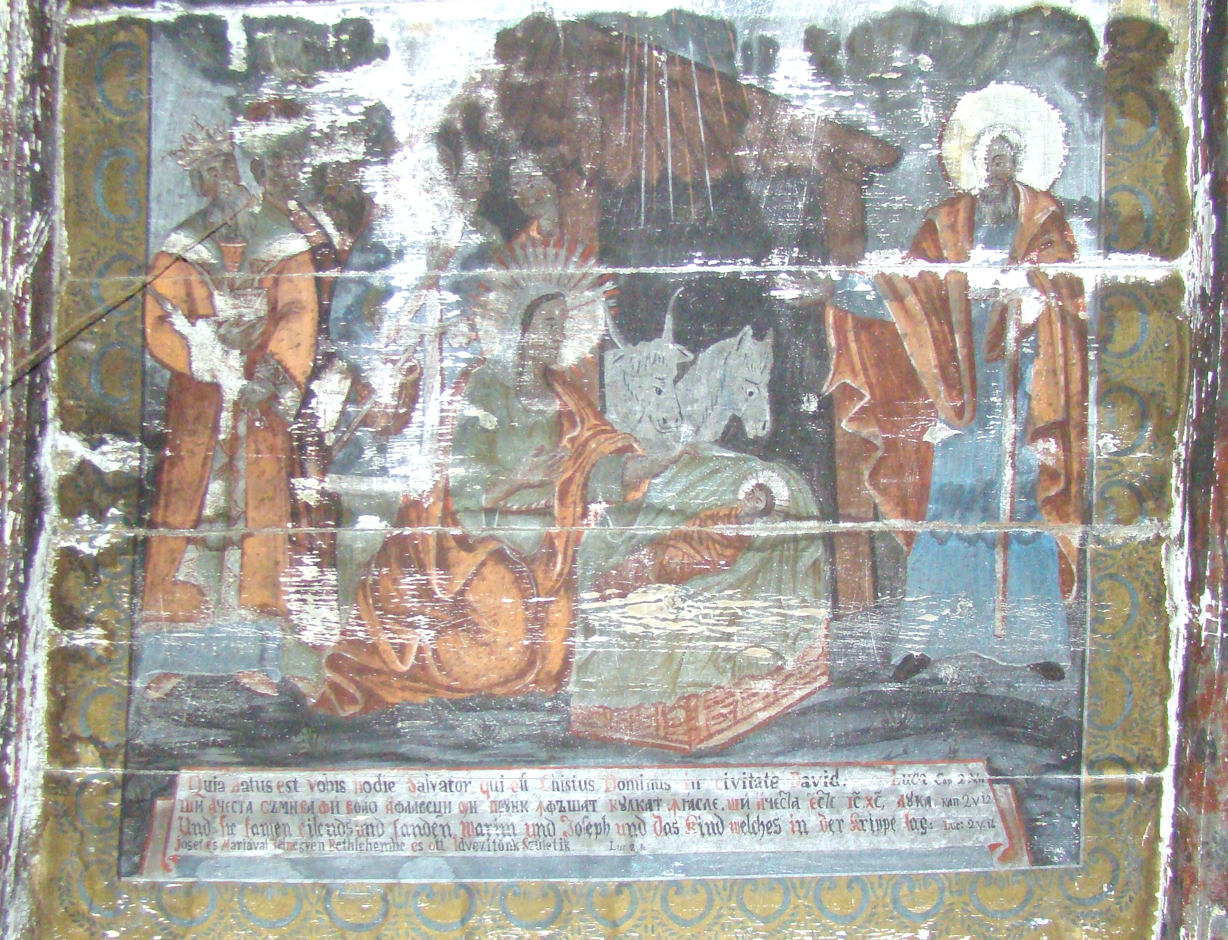 Biserica de lemn din Silivaș, județul Cluj